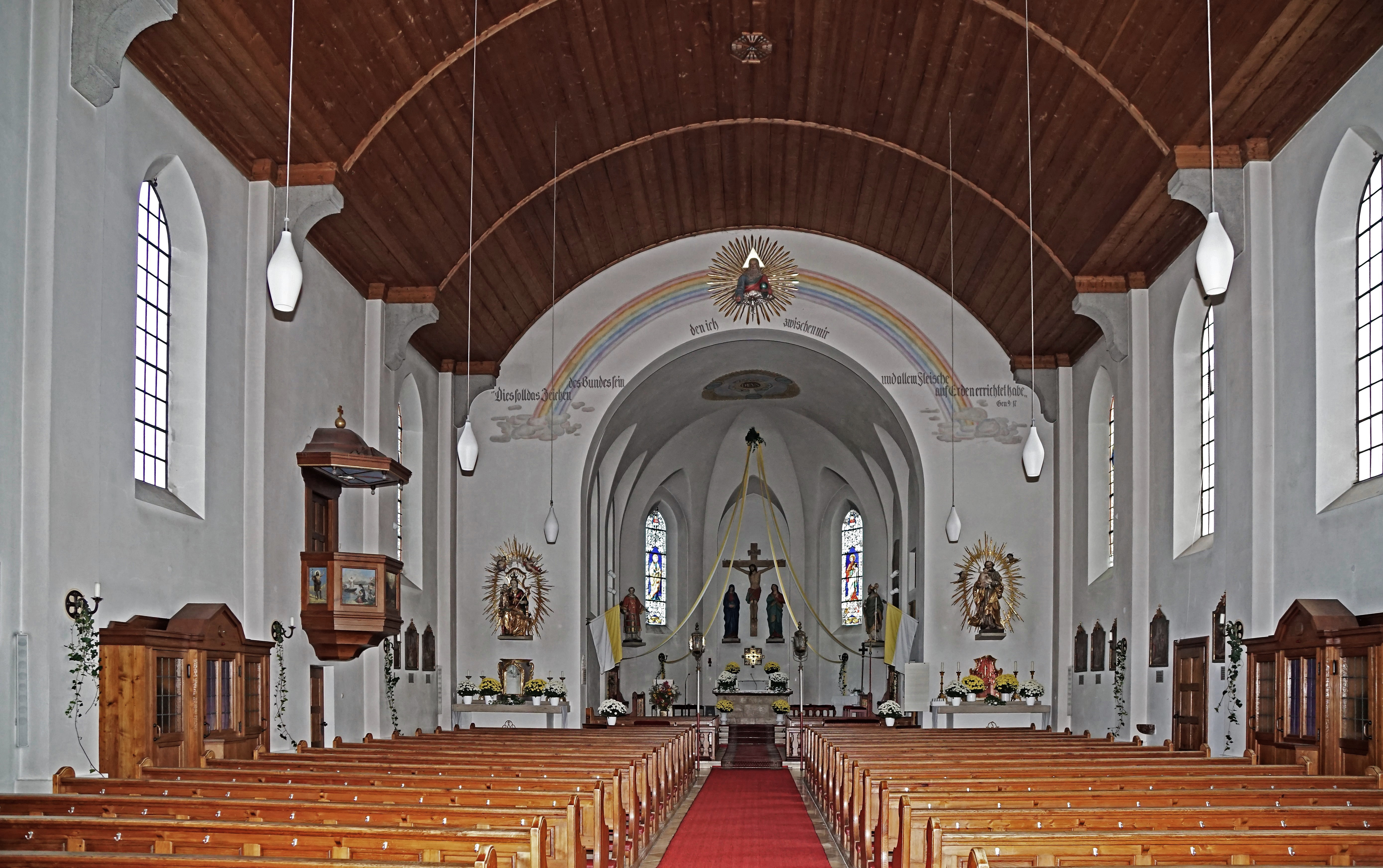 Kath. Pfarrkirche Bernau, Innenansicht gegen den Chor